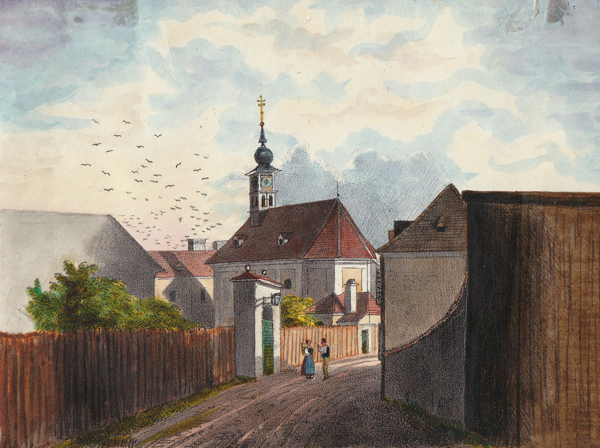 ehem. Margarethenkirche am Radetzkyplatz (Bild vor 1800)